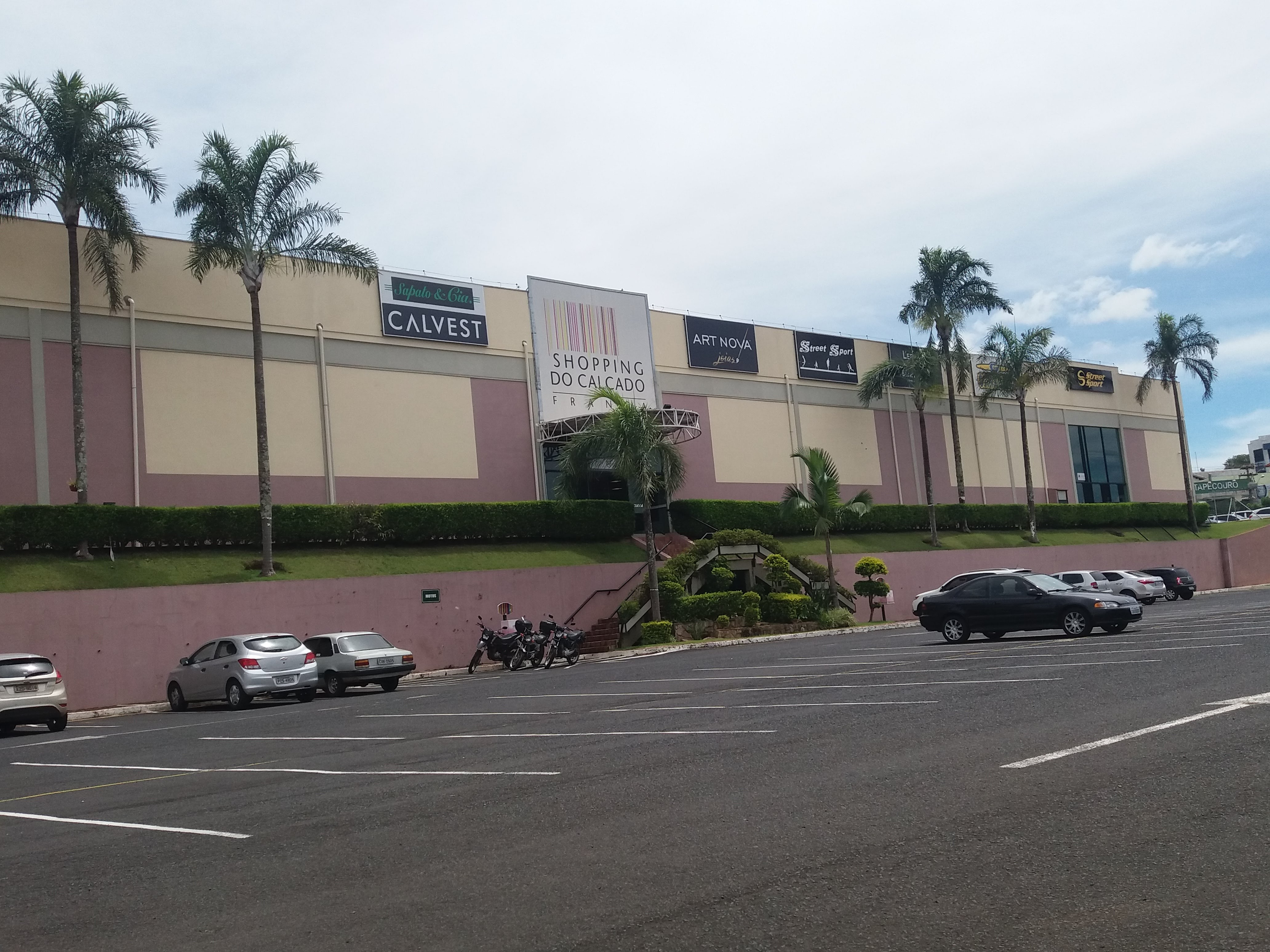 Shopping do Calçado, Franca (SP), Brazil